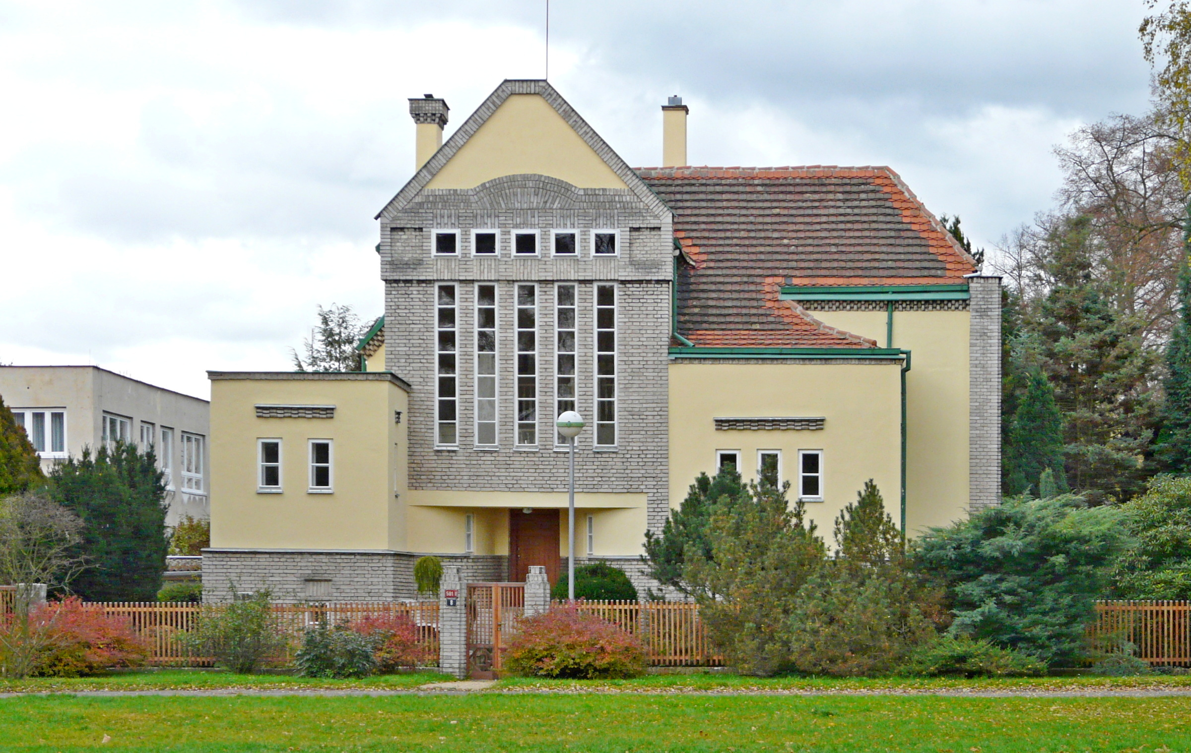 Otakar Novotný: Vila prof. Františka Lexy, Rakovník II, Štemberova 581.